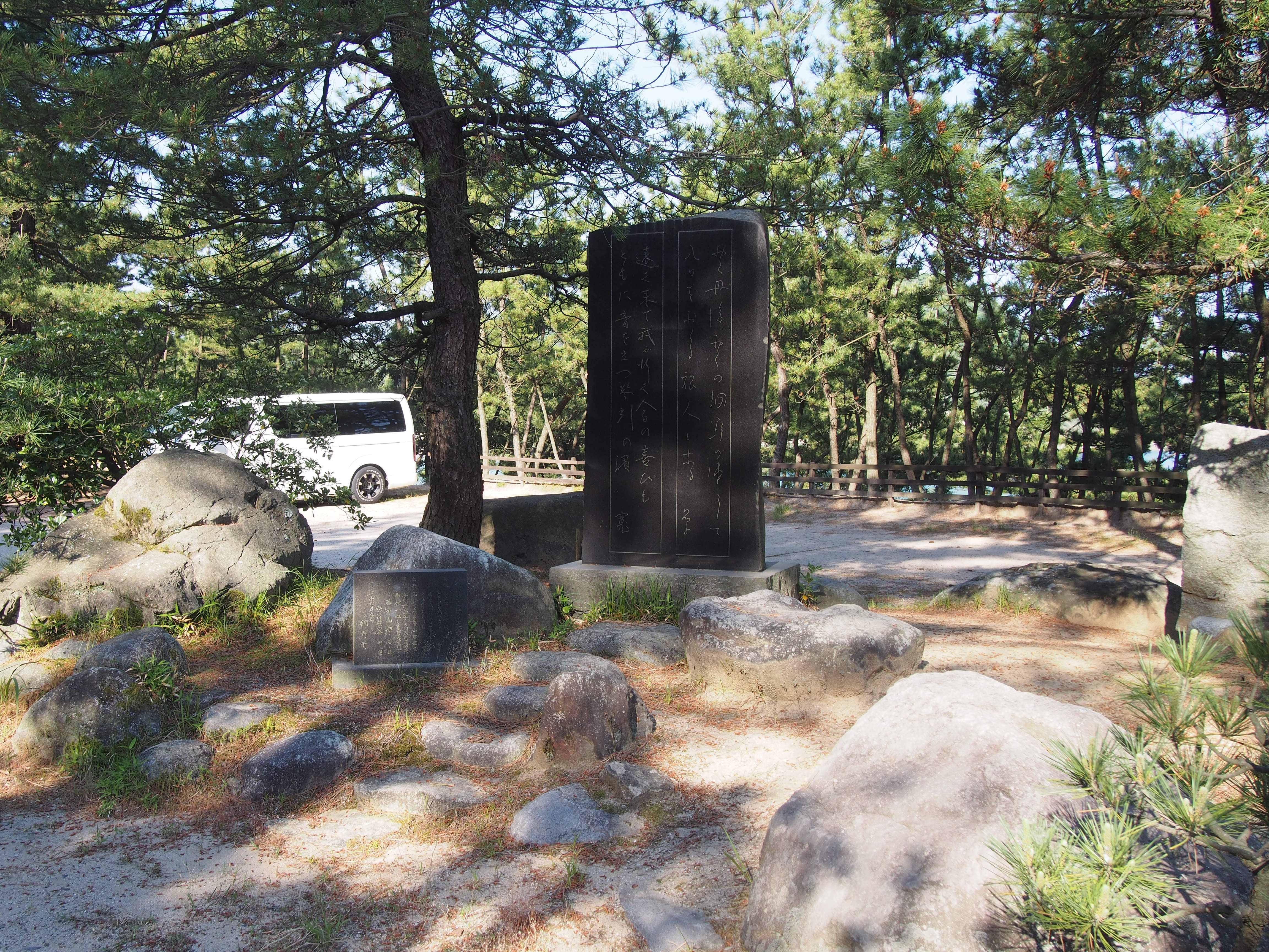 琴引浜（京都府京丹後市網野町掛津）に建立された与謝野晶子、与謝野寛の歌碑。